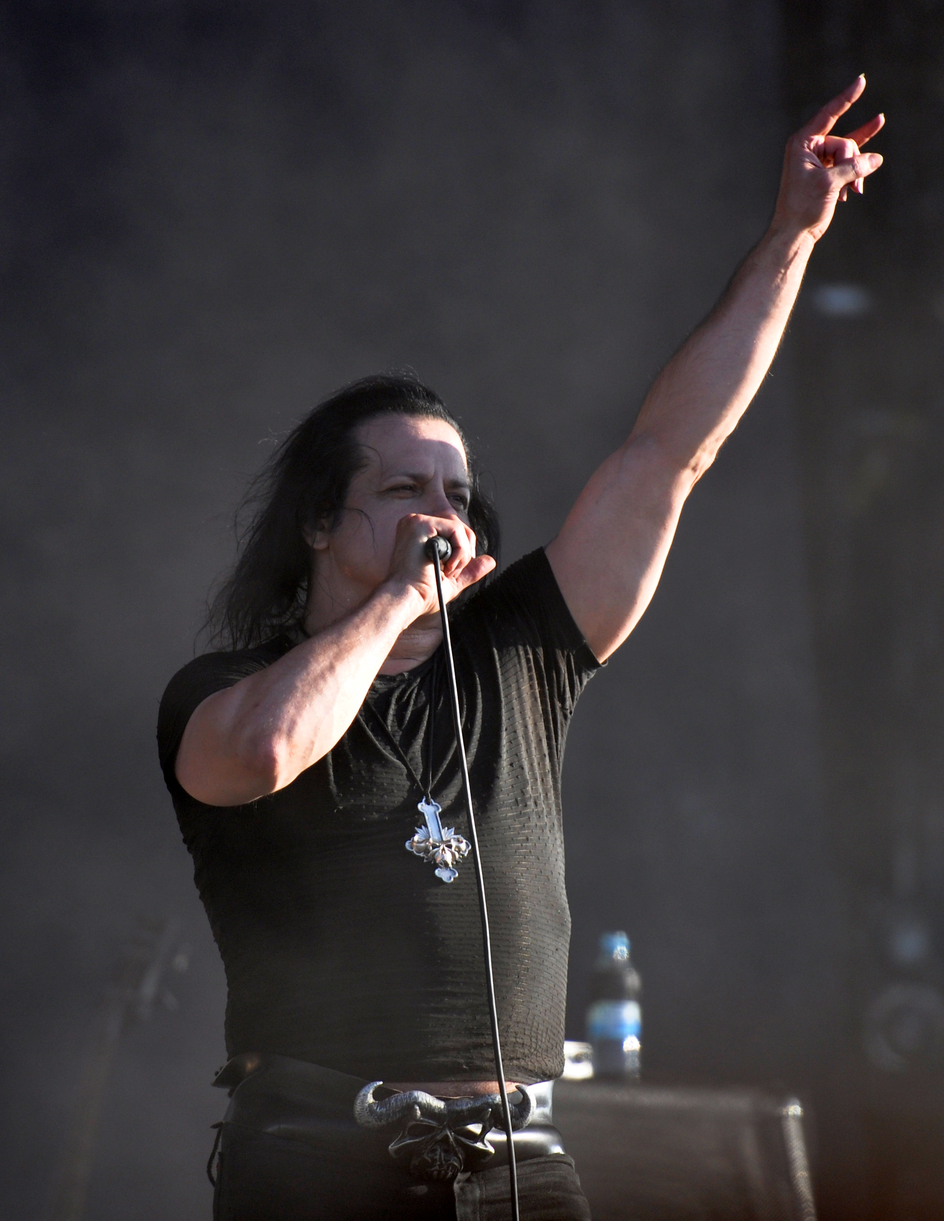 Danzig at Wacken Open Air 2013